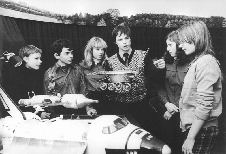 Schwerin, Jugendstunde im Planetarium ADN-ZB Pätzold-10.1.85 Schwerin: Jugend. Mit der Entwicklung der Raumflugtechnik macht Diplomastronomielehrer Klaus Walden die Schüler einer 8. Klasse der Theodor-Körner-Oberschule bekannt. In zwei speziellen Vorträgen werden die Jugendlichen mit dem Zusammenhang zwischen gesellschaftspolitischen Entwicklungsprozessen und der Astronomie vertraut gemacht. Seit 22 Jahren werden in dieser Sternwarte Jugendweiheteilnehmer betreut. Im Bezirk Schwerin unterstützen rund 7000 ehrenamtliche Helfer sowie 39 Jugendstundezentren in Betrieben und anderen Einrichtungen die Vorbereitung der Jugendweihe.